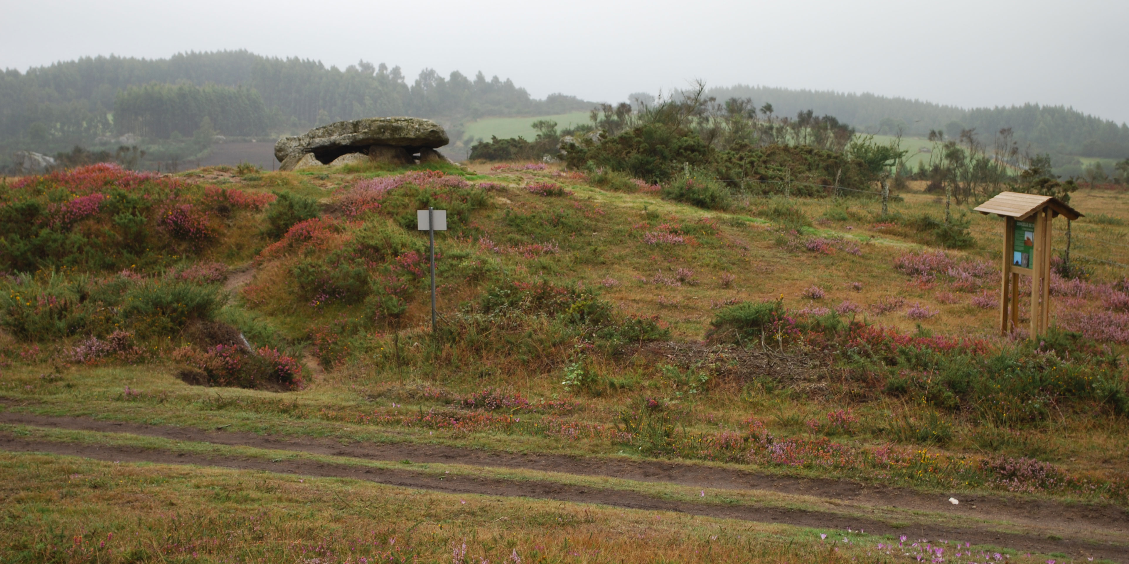 Dolmen da Muruxosa visto dende un penedo próximo. O camiño en primeiro término é o Camiño Real. Toques A Coruña Galiza Spain